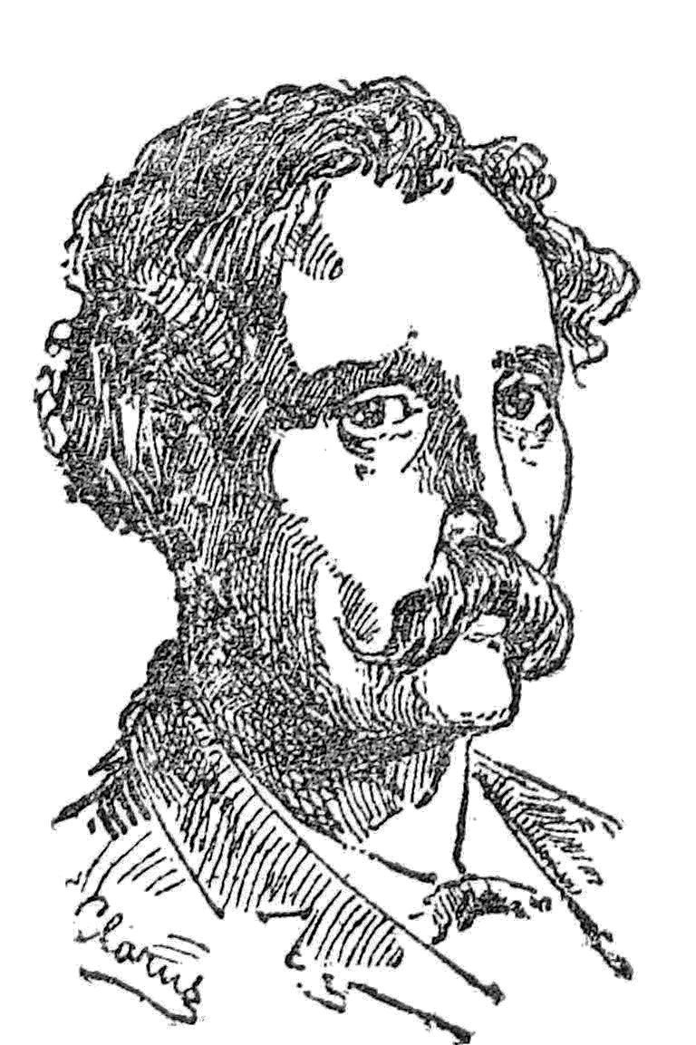 "Dereure (Simon), ouvrier cordonnier, ancien membre de la Commune de Paris".